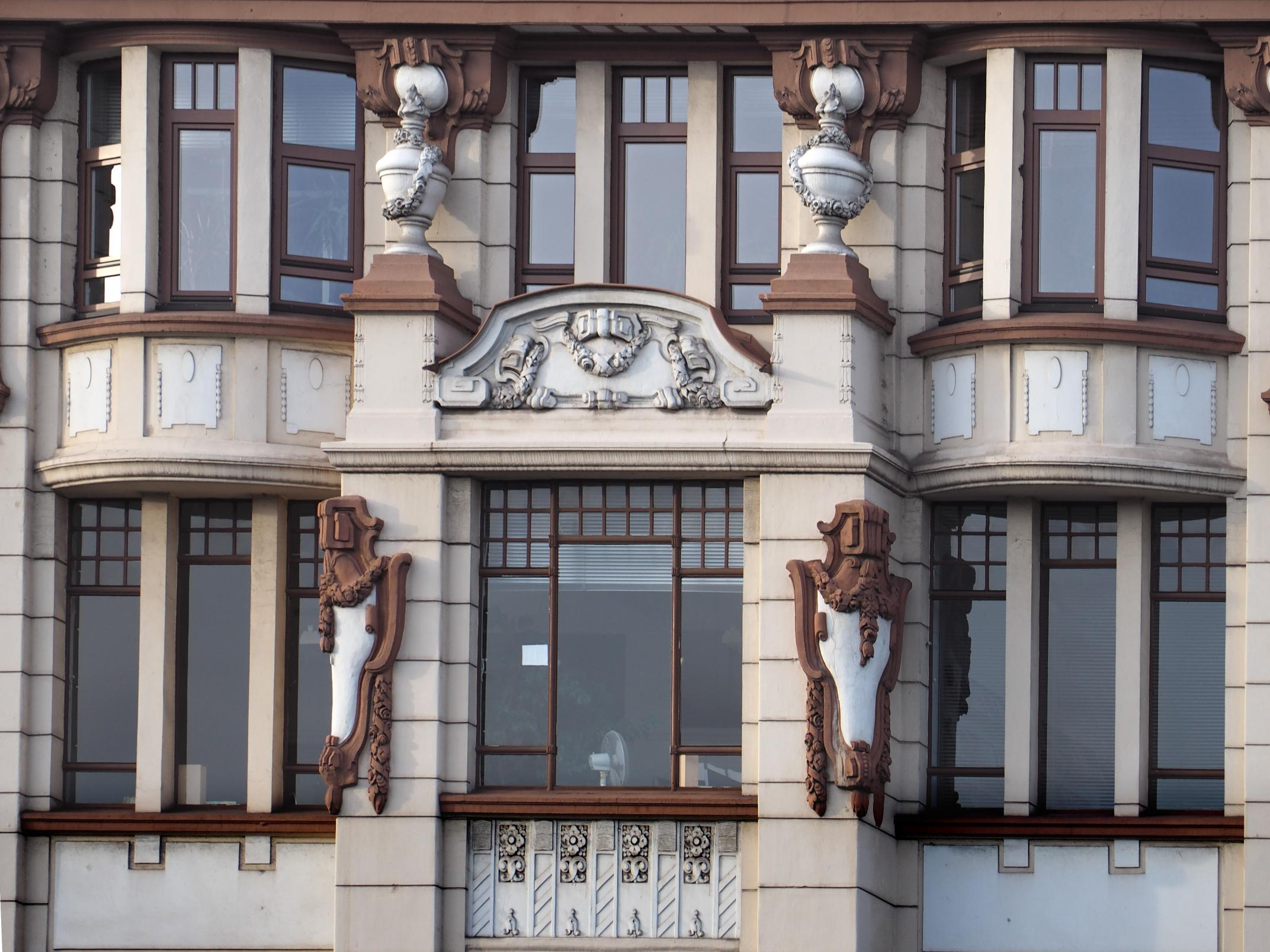 Hamburg-Altstadt, Hansaburg,Detail. Foto: Dezember 2015